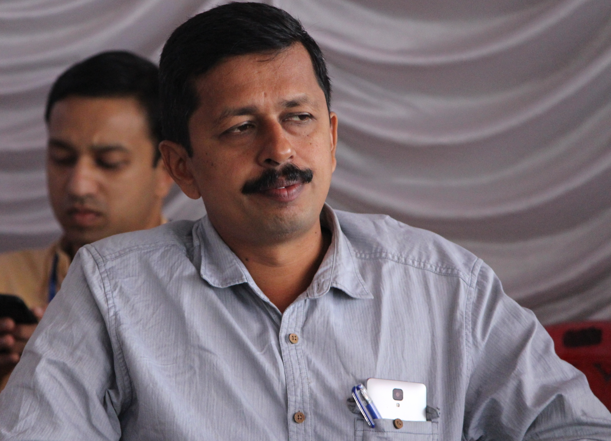 എസ്. ഹരീഷ് കോഴിക്കോട് ലിറ്ററേച്ചര്‍ ഫെസ്റ്റിവലില്‍ (2017)